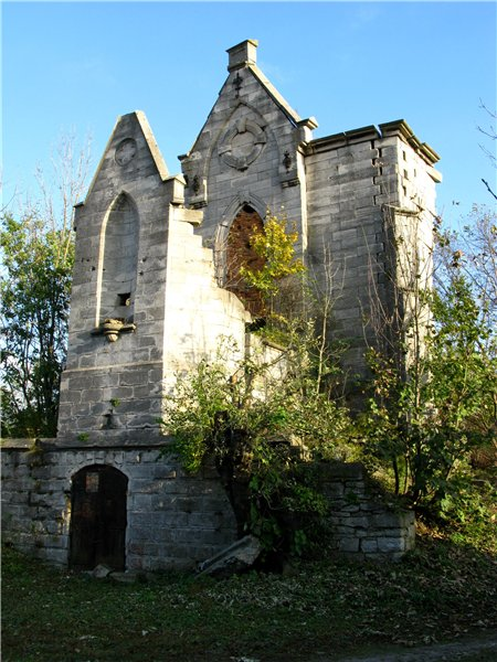 Каплиця(мур.), Скала-Подільська, вул.Крушельницької